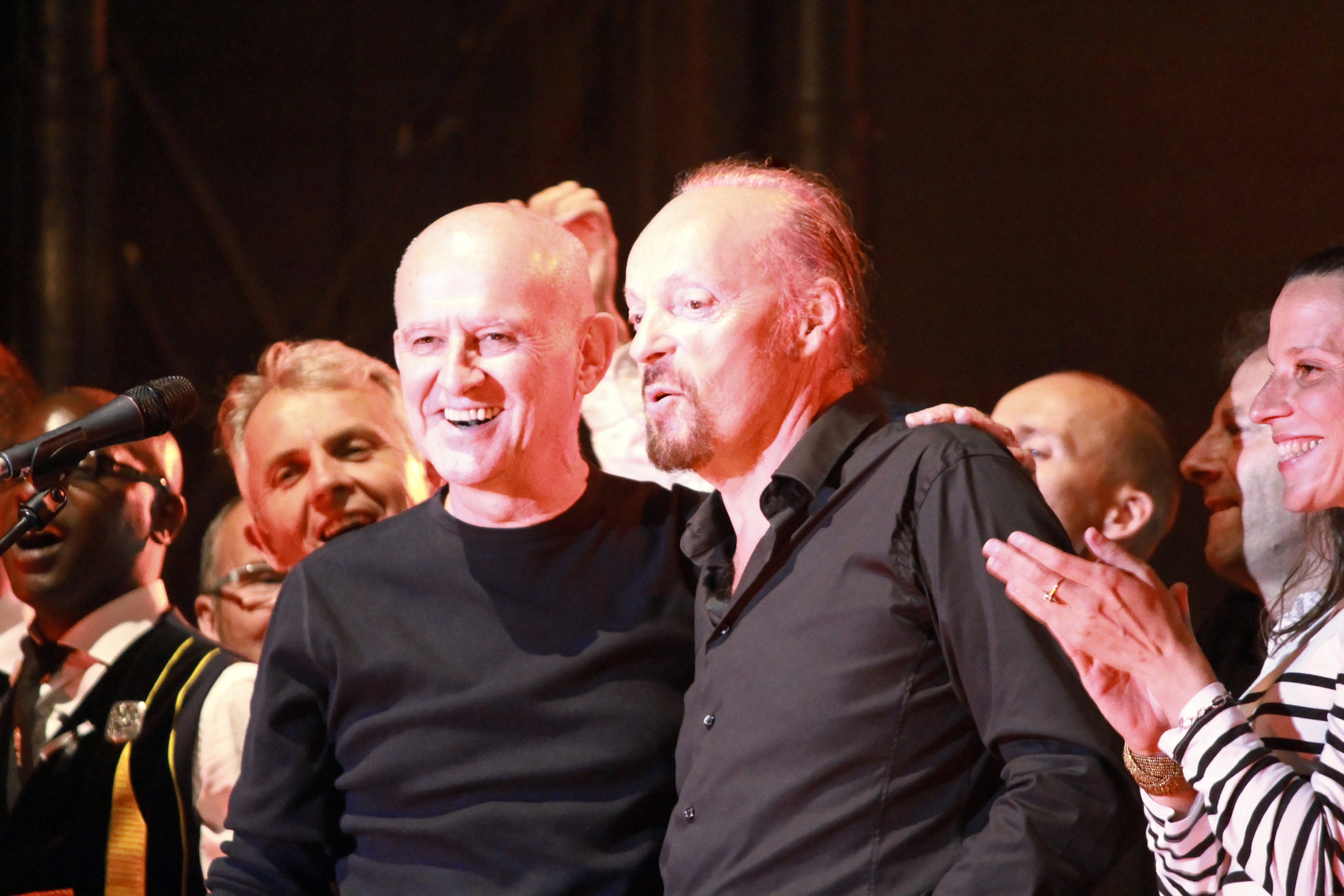 Dan Ar Braz et Alan Stivell lors de son concert inaugural de la tournée liée à la promotion de l'album Celebration, lors du Festival Interceltique de Lorient 2012.